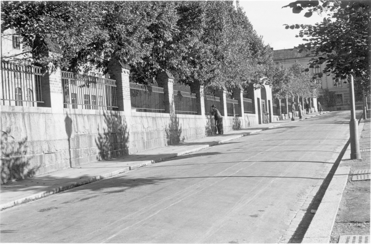 Oluf Ryghs gate foran Fagerborg skole. Ukjent fotograf. Fra Park- og idrettsvesenets samling hos Oslo byarkiv.